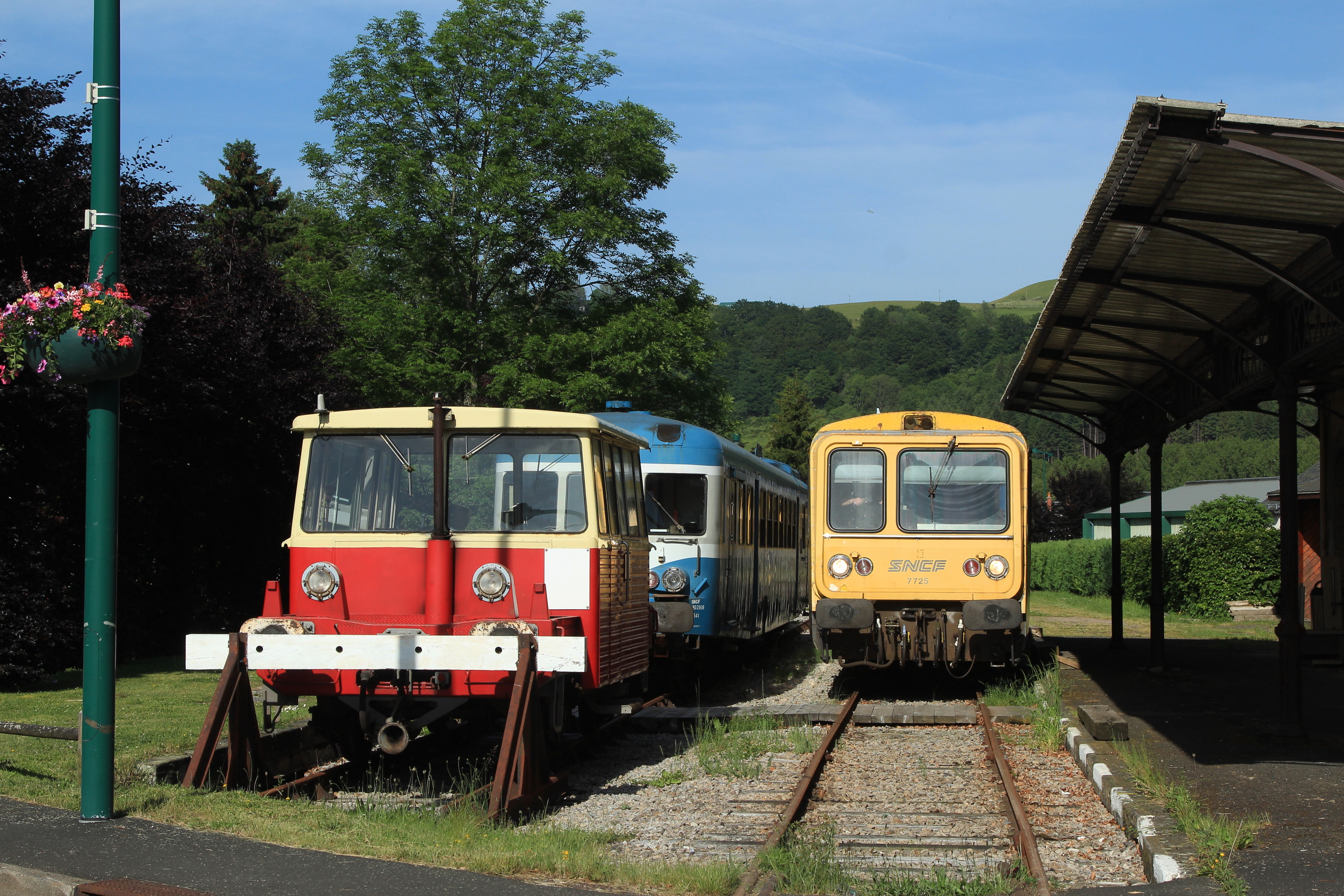 X 2725 en jaune TER, draisine en rouge et crème et X 2908 en bleu Auvergne stationnent en gare de Riom-ès-Montagnes.